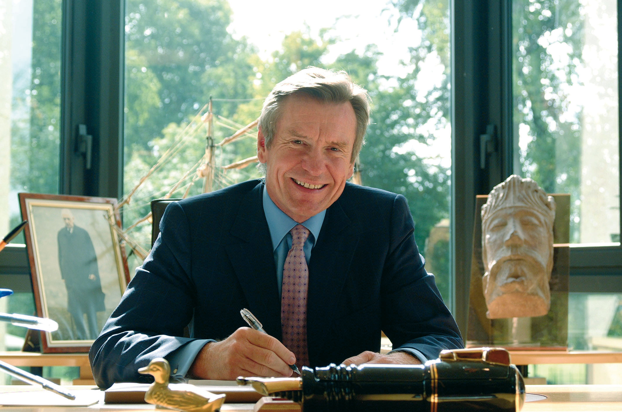 photo député Jean-François Mancel